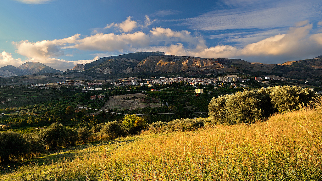 Pano Bivona